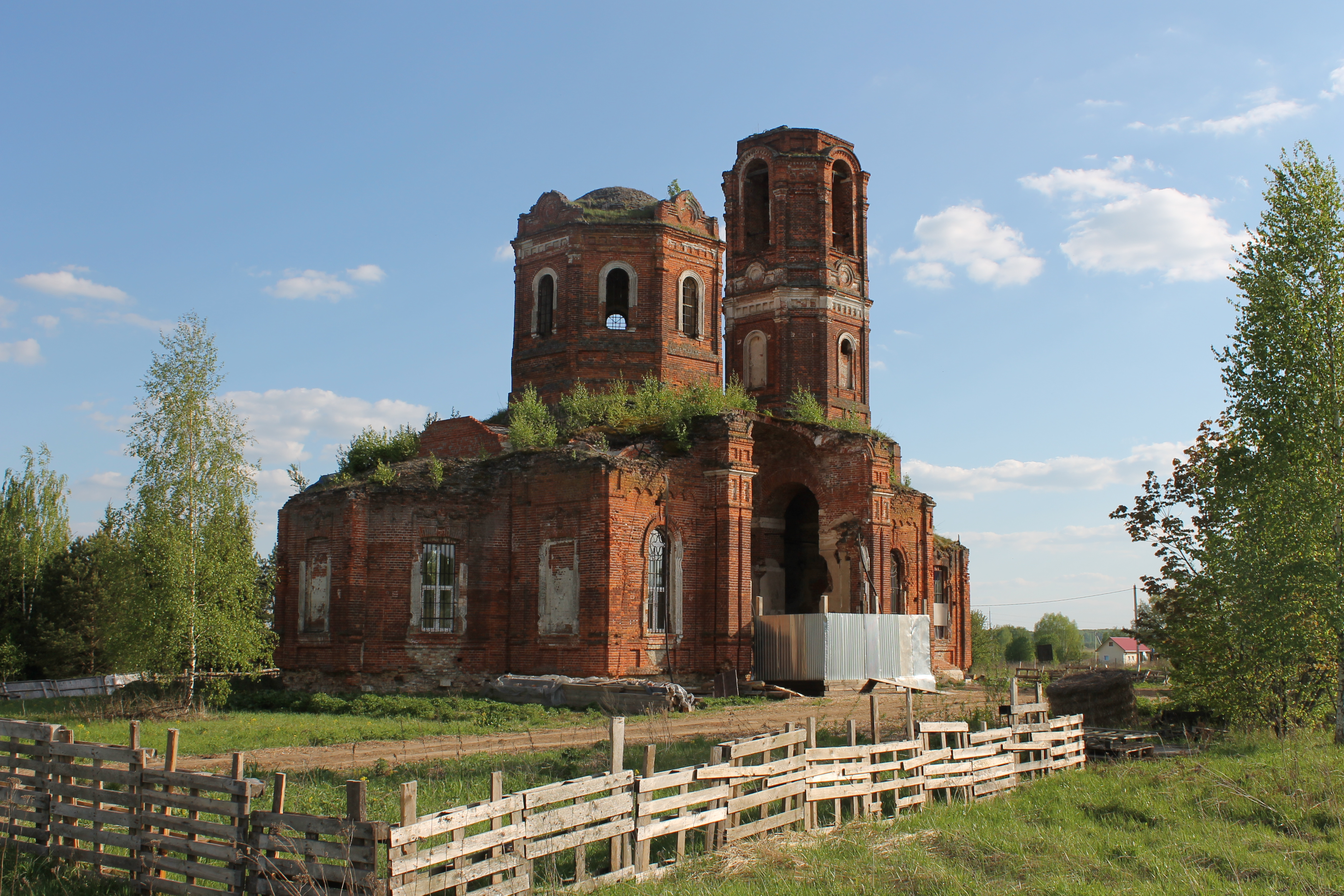 Церковь Рождества Богородицы в селе Верховлять Ступинского района Московской области